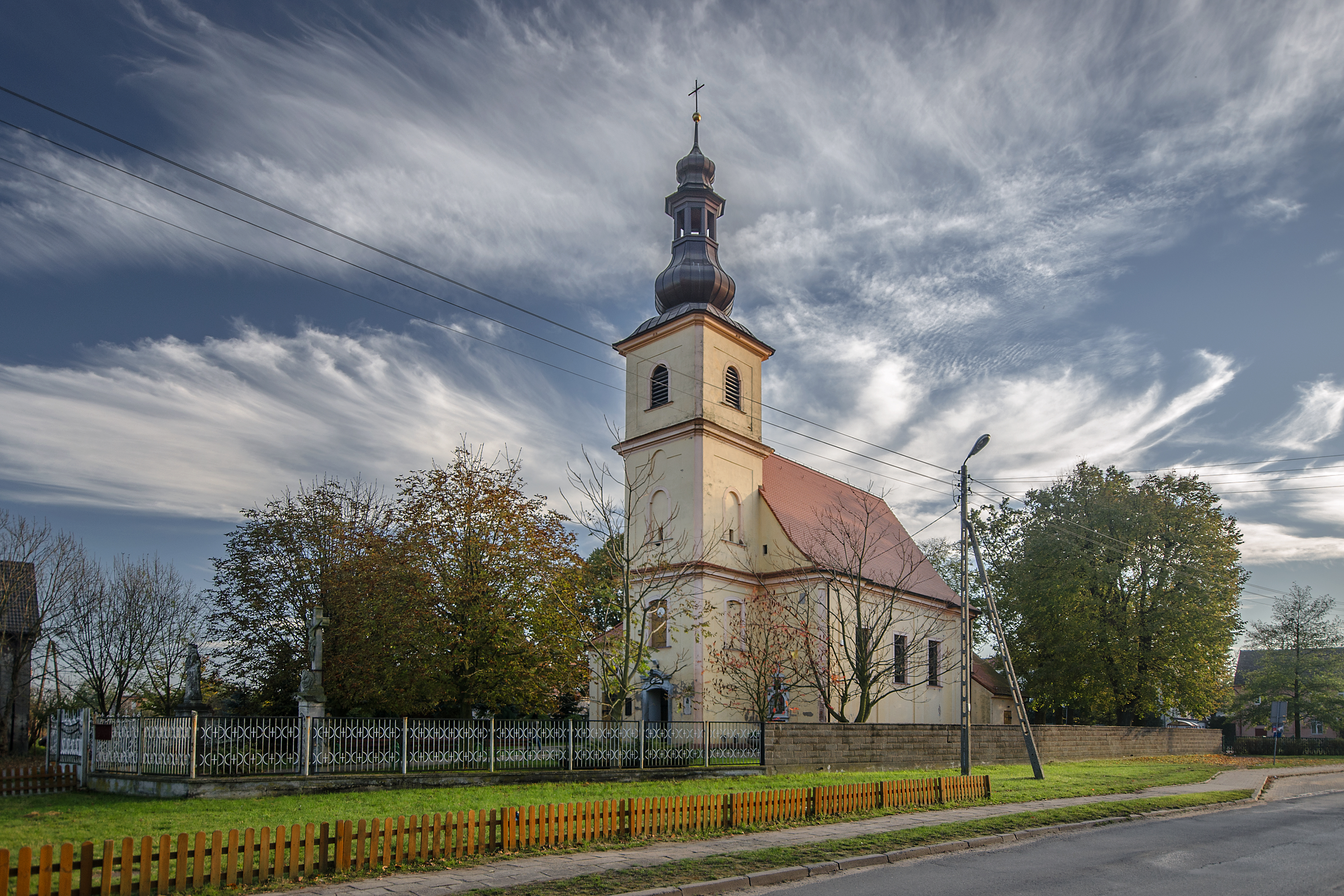 Miłoszyce, kościół par. p.w. św. Mikołaja Biskupa, 1714-1716, 1905-1909